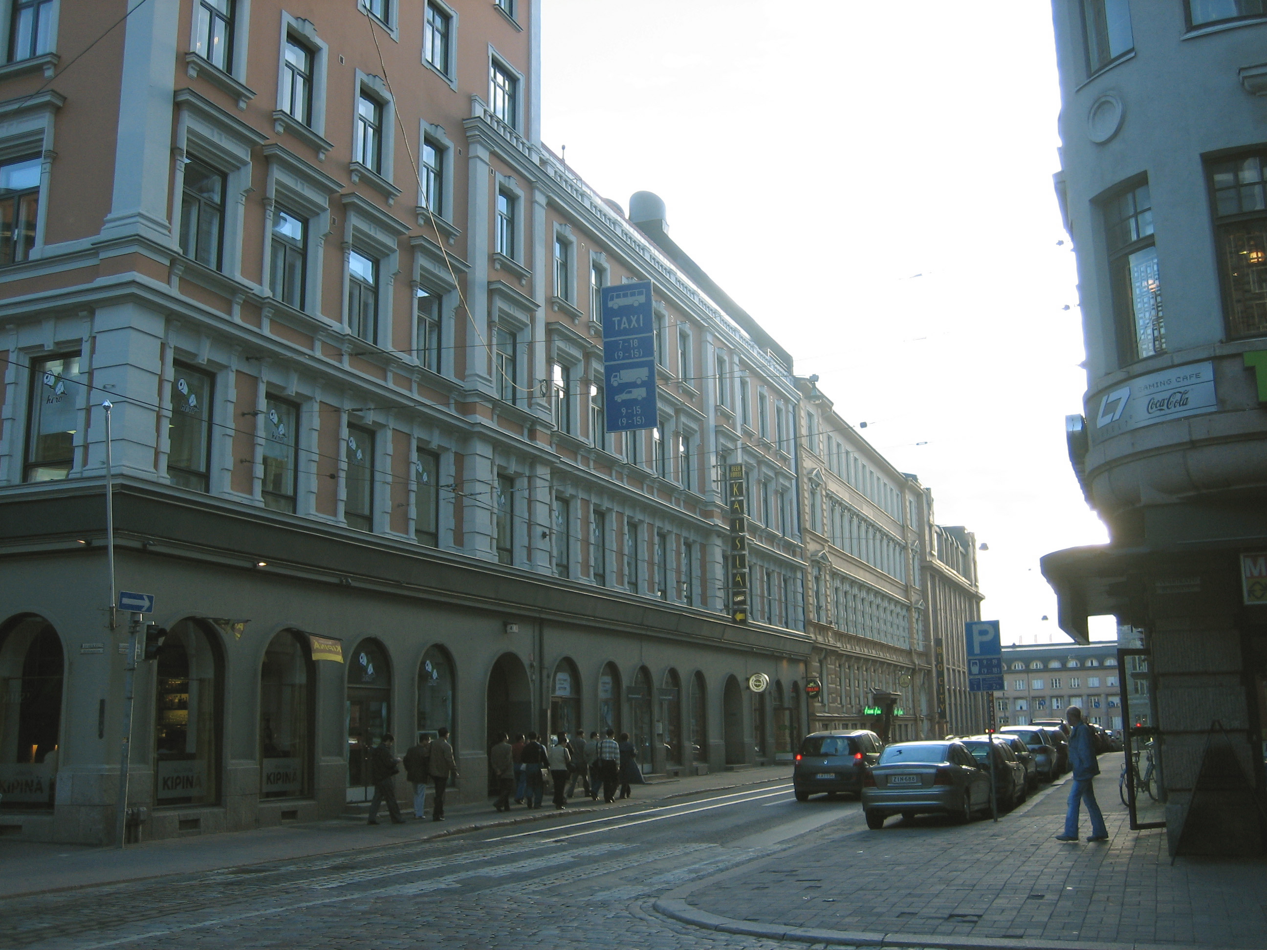 Vilhonkatua Kaisaniemestä päin katsottuna. Syyskuu 2005.